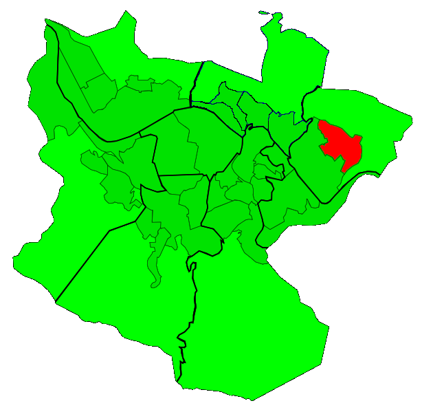 Situación del barrio de Ocharcoaga en el plano de Bilbao.